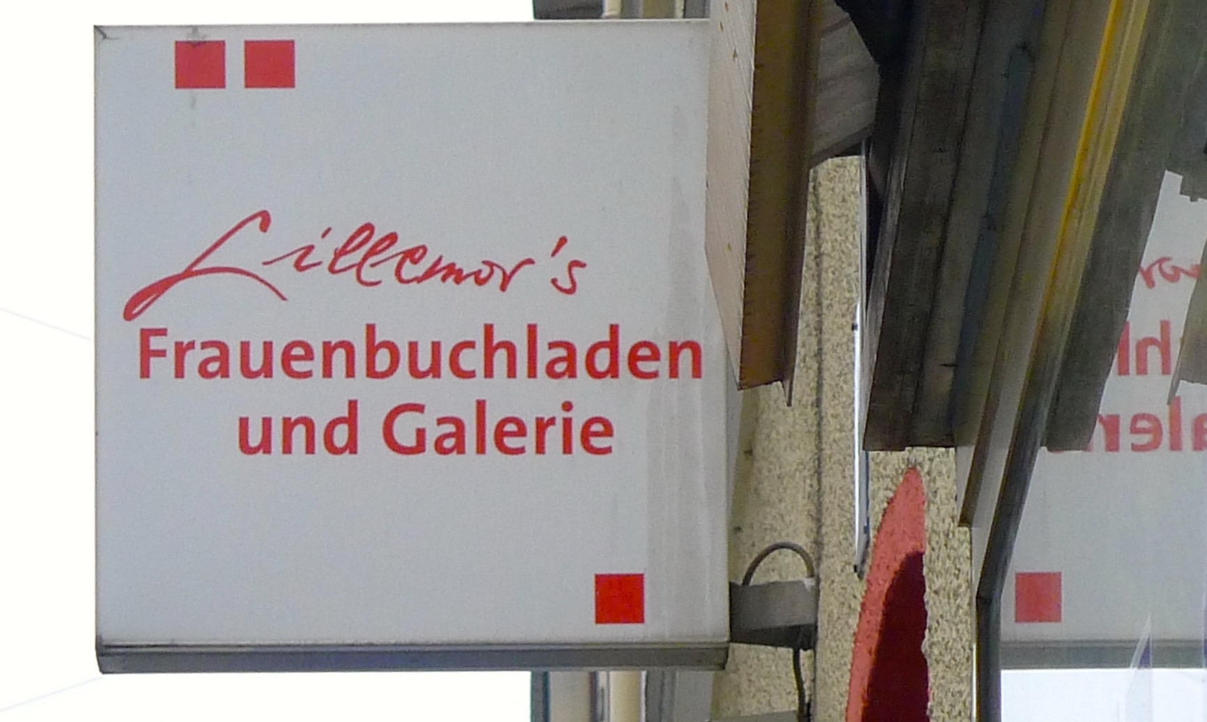 Schild über dem Frauenbuchladen "Lillemor's" in München, Barerstraße 70